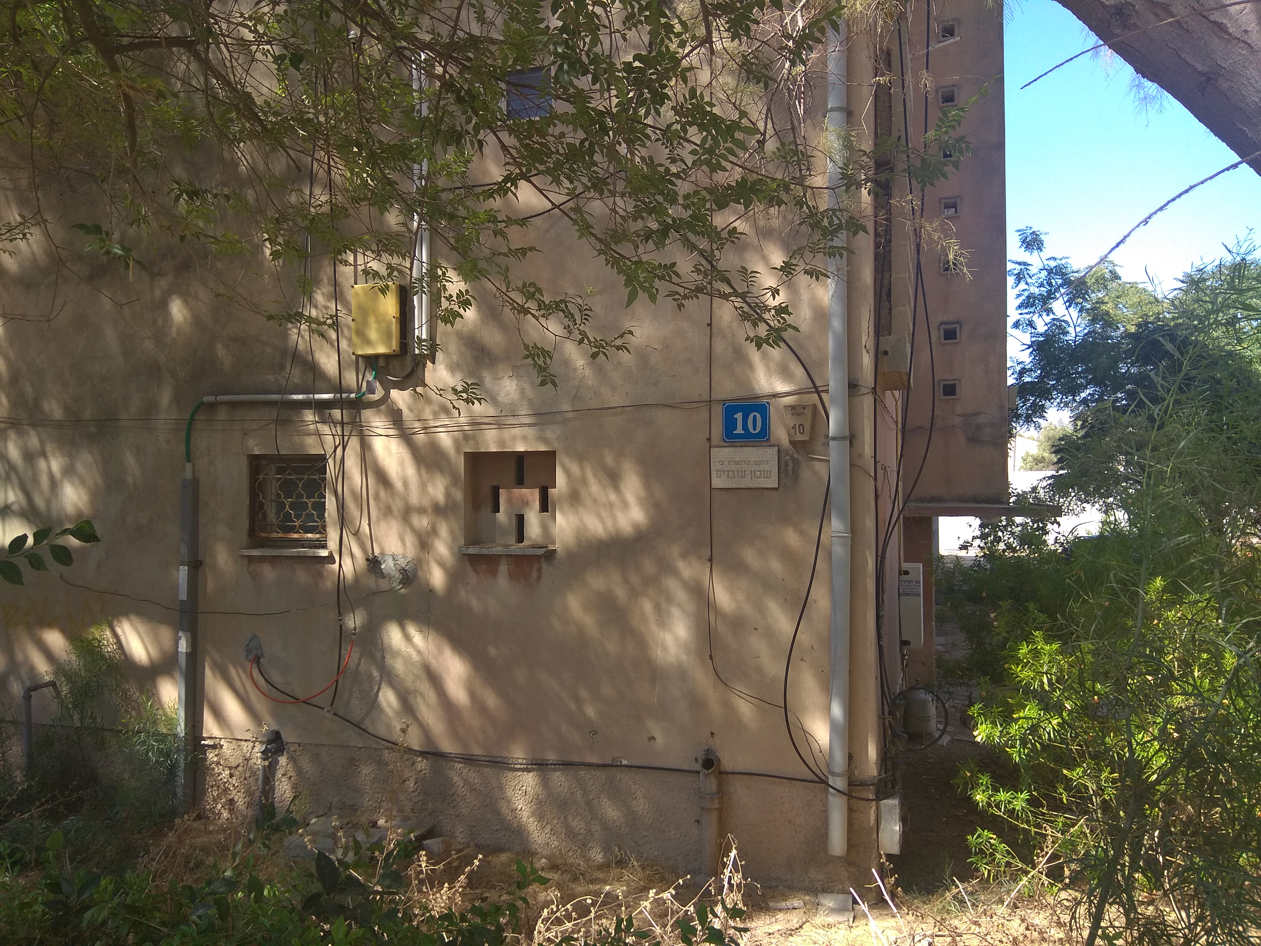 בניין שנבנה על ידי החברה